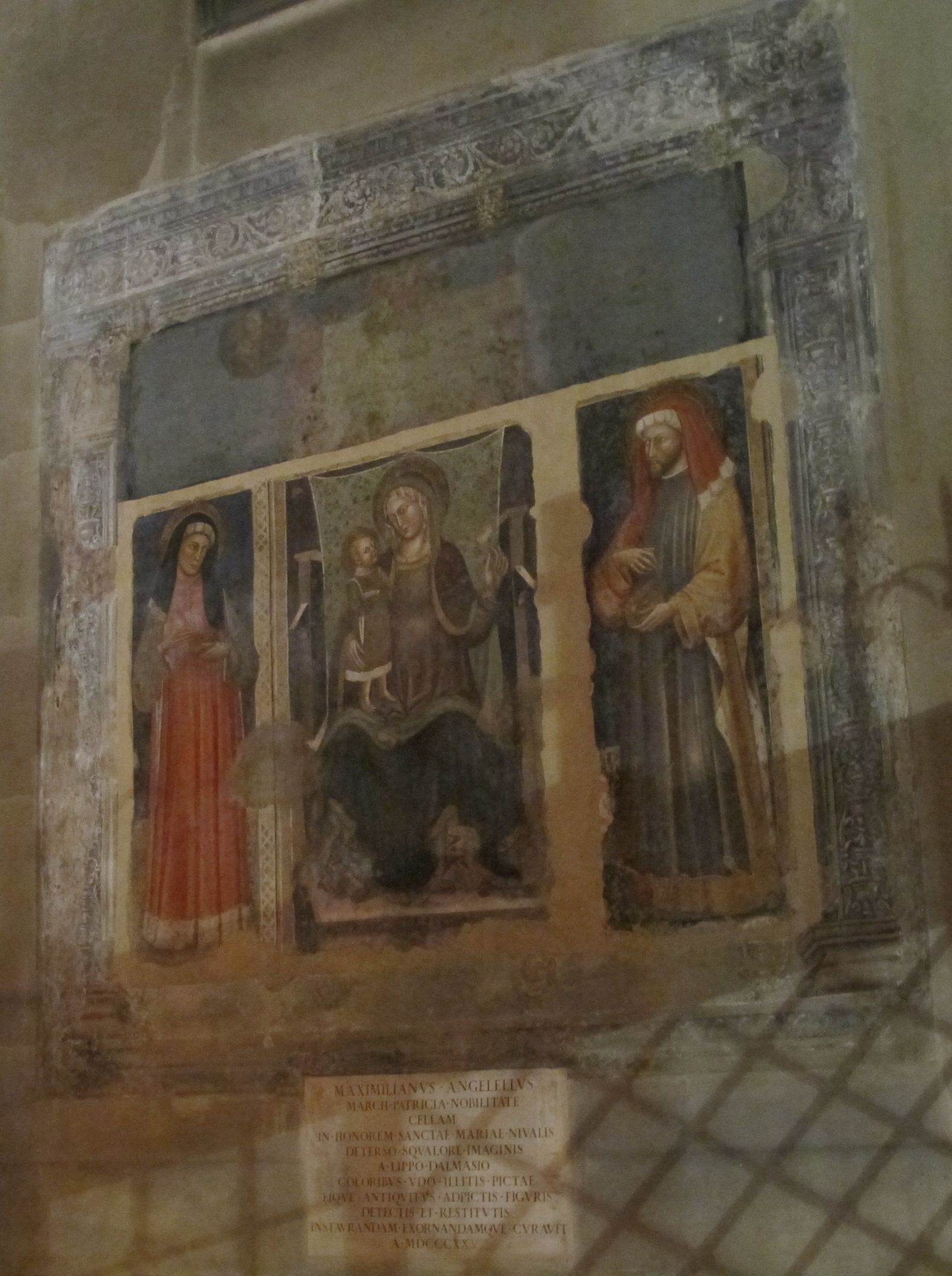 Santa Maria dei Servi, bo, interno, Madonna col Bambino e i santi Cosma e Damiano di Lippo di Dalmasio